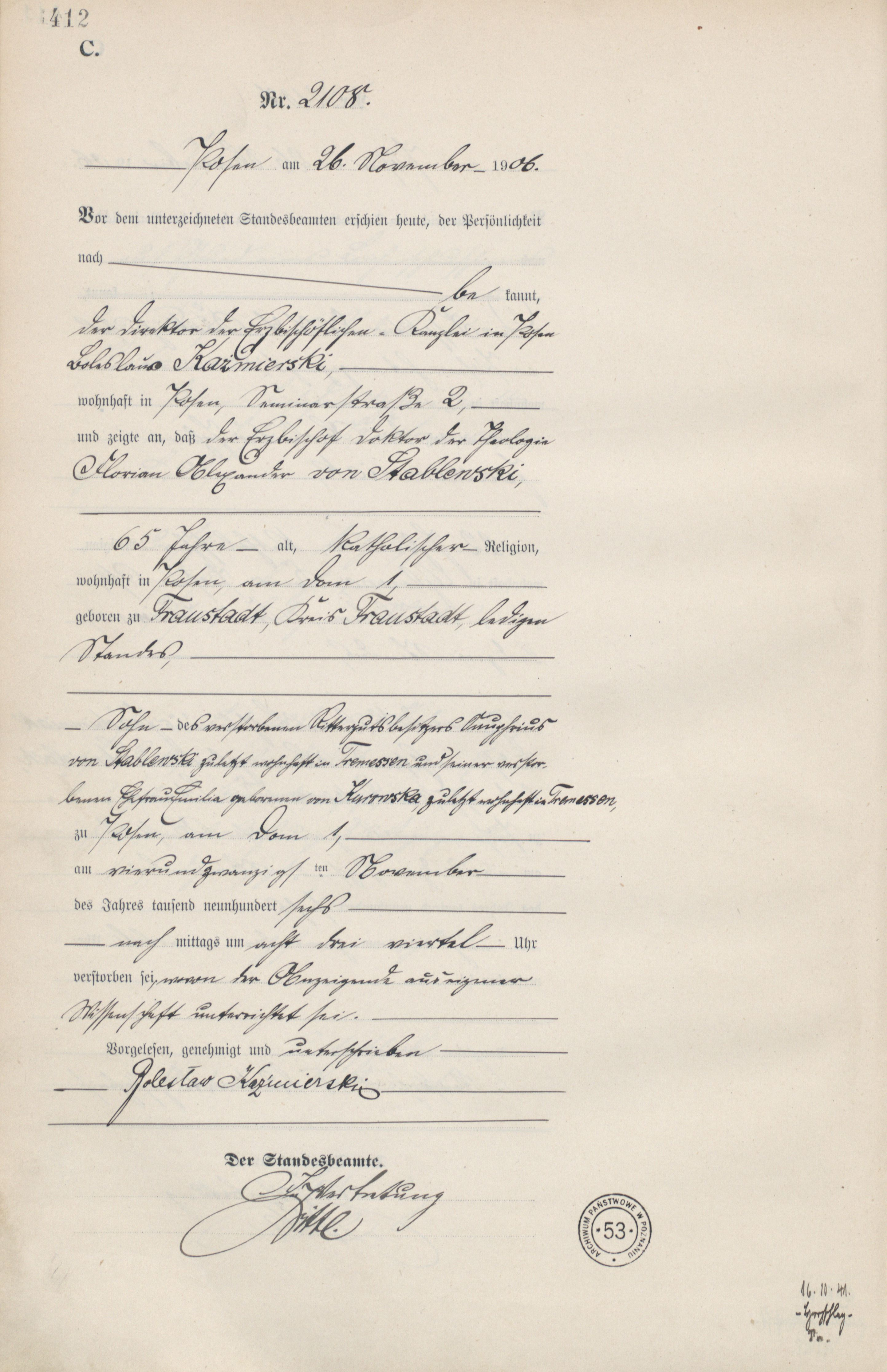 numer 2108